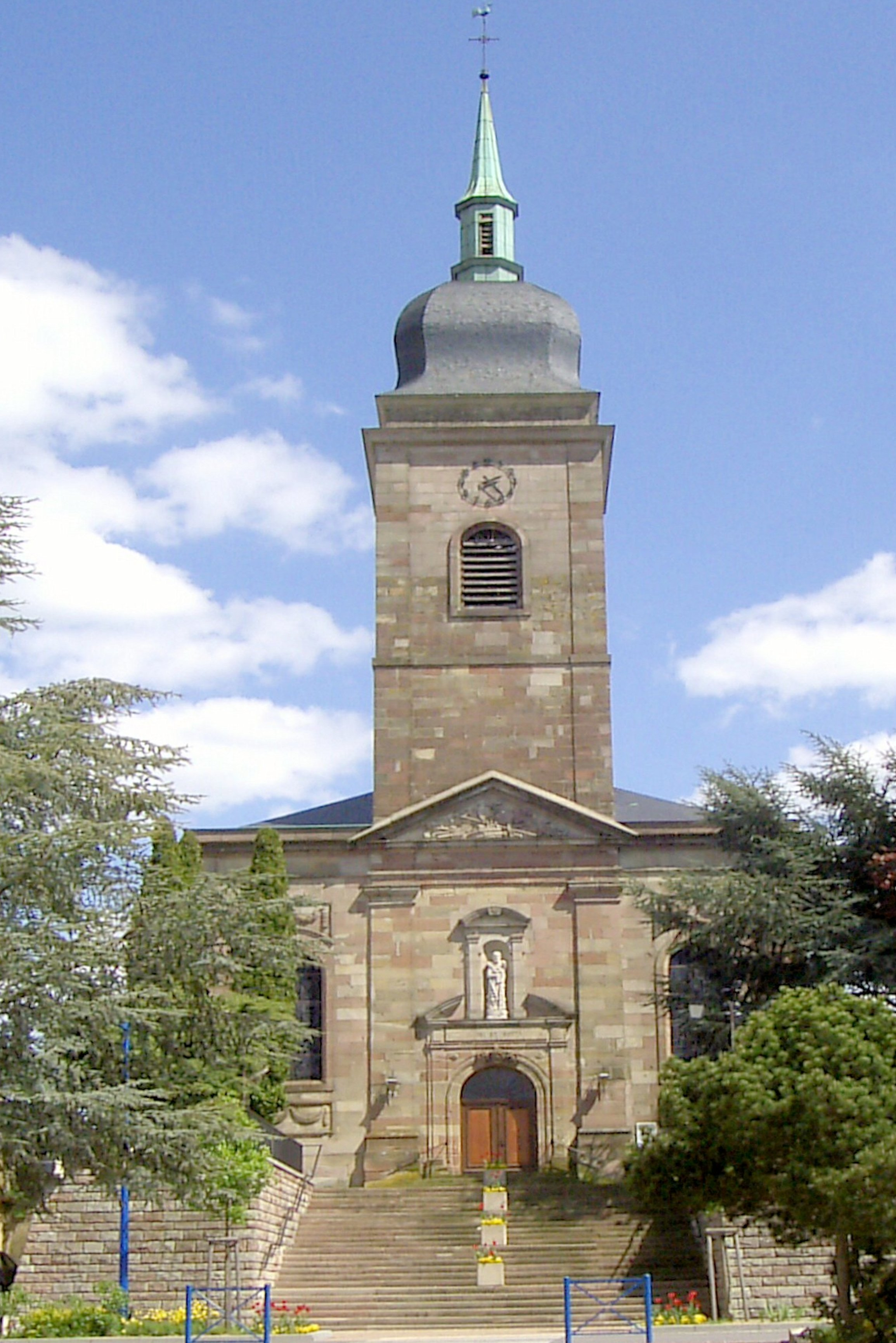 L'église Saint-Pierre á Puttelange-aux-Lacs